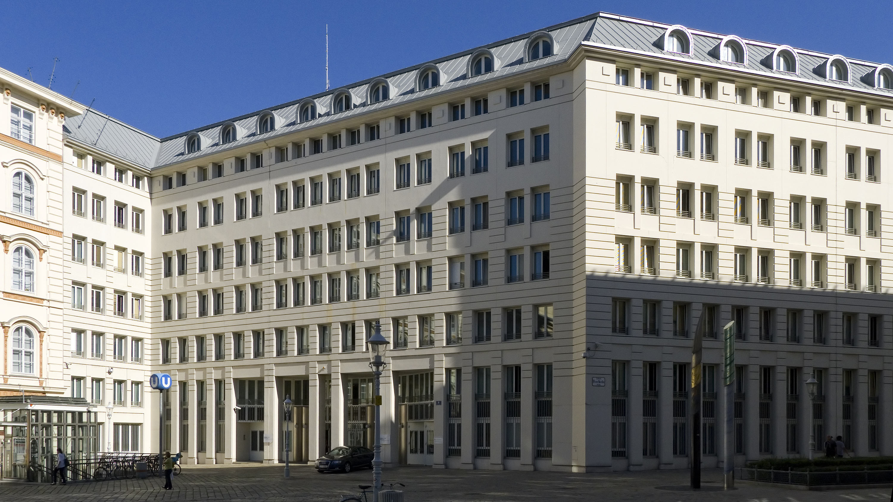 Innenministerium, Minoritenplatz 9 in Wien 1